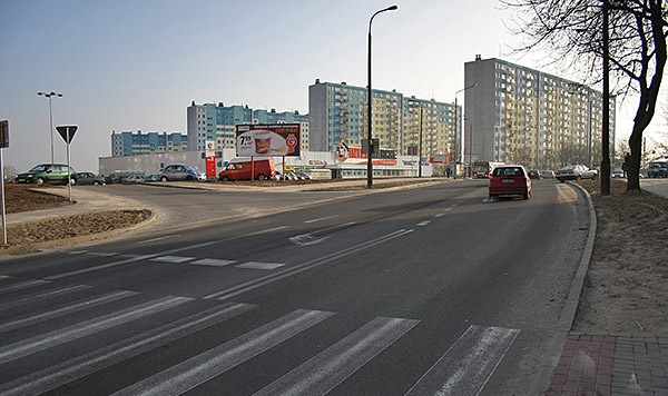 Ulica Fredry w Gorzowie Wlkp.